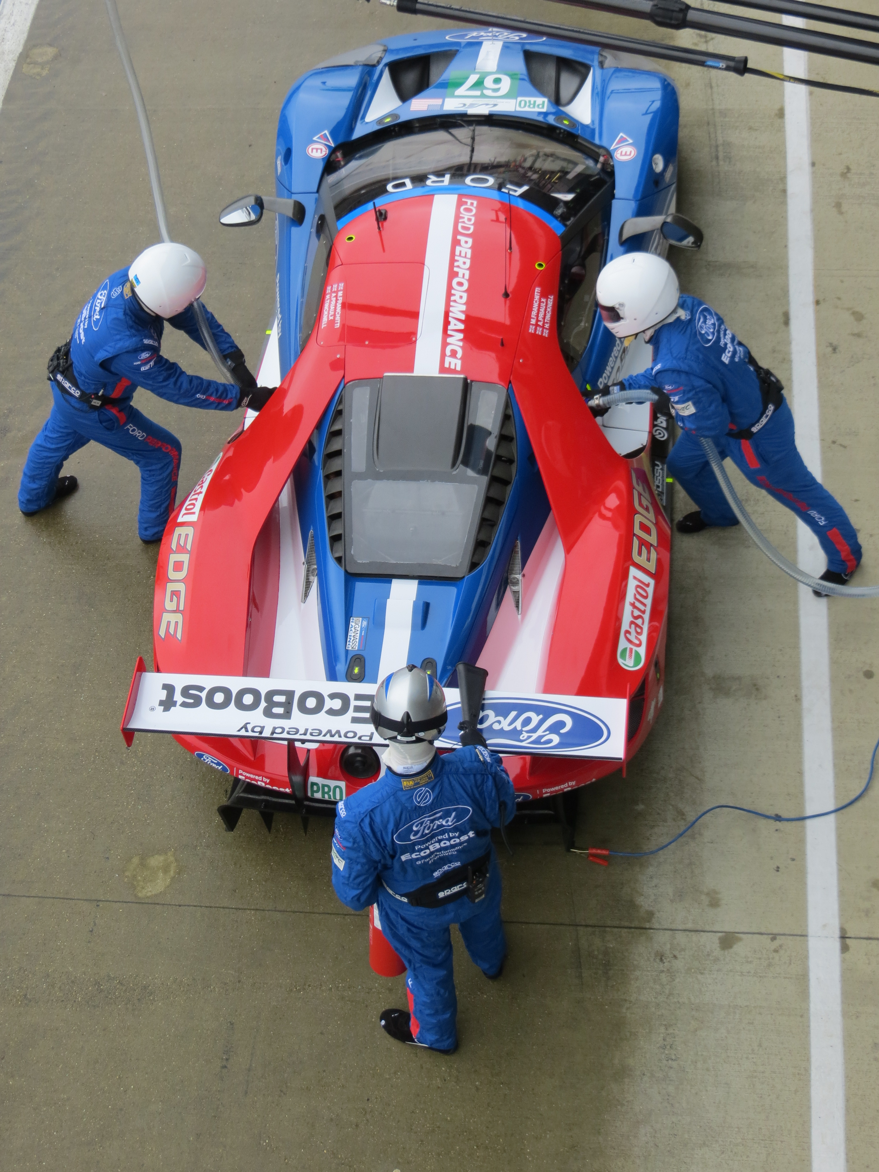 La Ford GT en train de se faire ravitailler, pendant les essais des 6 Heures de Silverstone 2016.